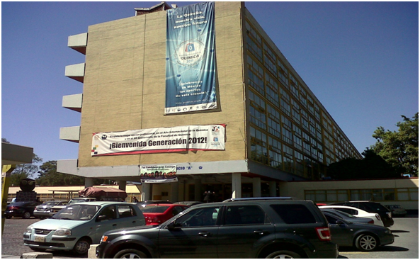 Edificio de quimica